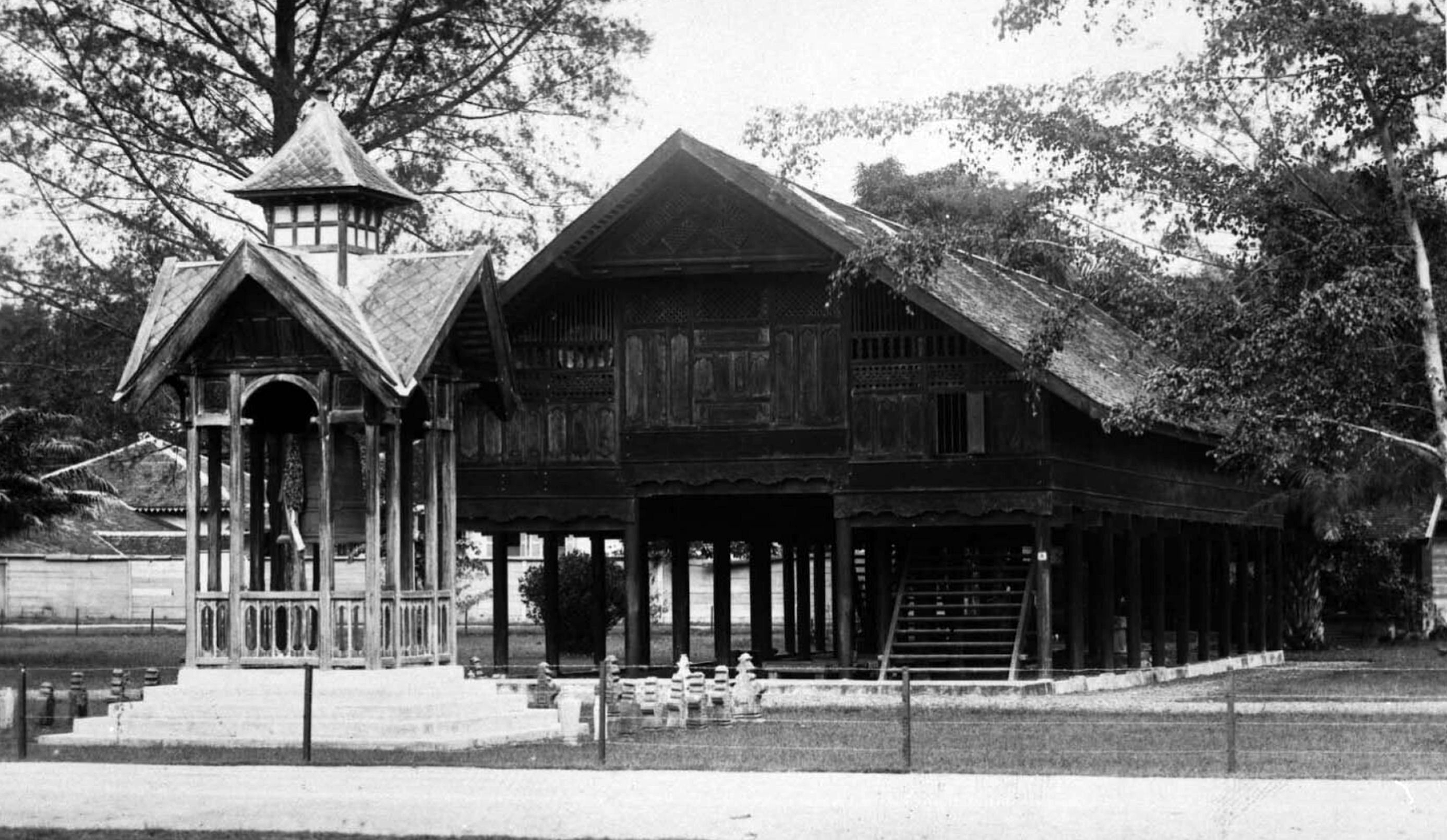 Foto. Het Atjeh Museum werd opgericht door generaal Swart, goeverneur van Atjeh. Het gebouw kon als een blokkendoos uit elkaar genomen worden, de bedoeling was dat het ooit in zijn geheel naar Nederland verplaatst zou worden. In 1914 was het op de Koloniale Tentoonstelling te Semarang geplaatst. Op 31 augustus 1915 werd het gebouw op de Esplanade te Koeta Radja (tegenwoordig: Banda Aceh) geopend. Reeds vanaf de oprichting was de privé-collectie etnografica van Friedrich Stammeshaus, tevens conservator van het museum, de belangrijkste bezienswaardigheid van het museum. Nadat Stammeshaus zijn collectie in 1931 aan het Koloniaal Museum verkocht, bleef slechts een klein aantal objecten achter in het museum (Stammeshaus, p. 96). Het Atjeh Museum in Koetaradja